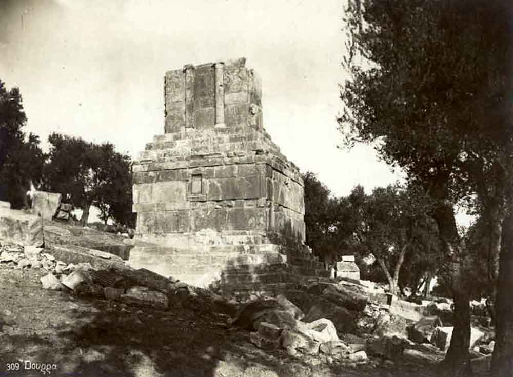 Le mausolée punique de Dougga avant restauration Bertrand Bouret